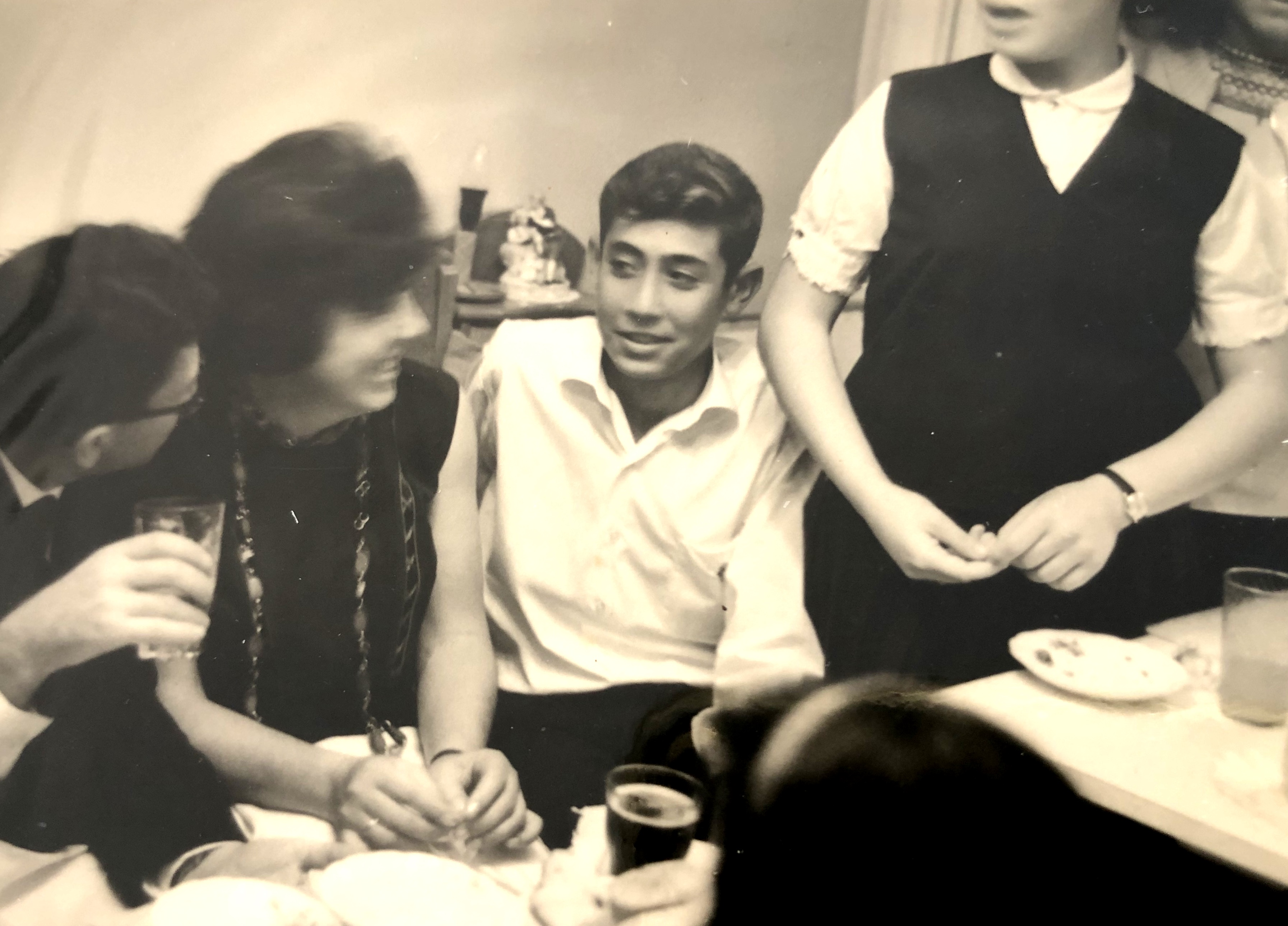 הנער אלי רונן חוגג בר מצווה עם המורה 1966